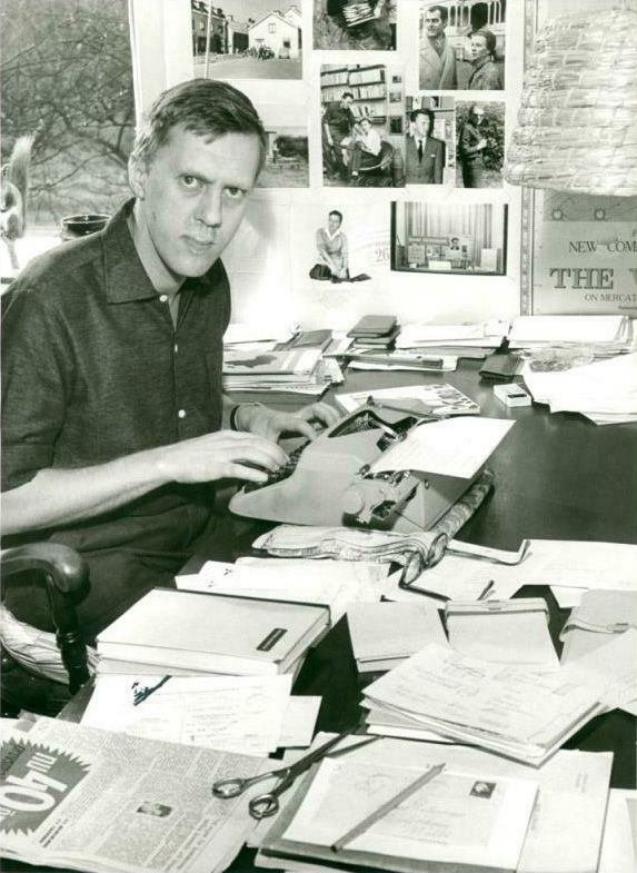 Foto på Hans Peterson infört i Svenska Dagbladet 1961-02-19.